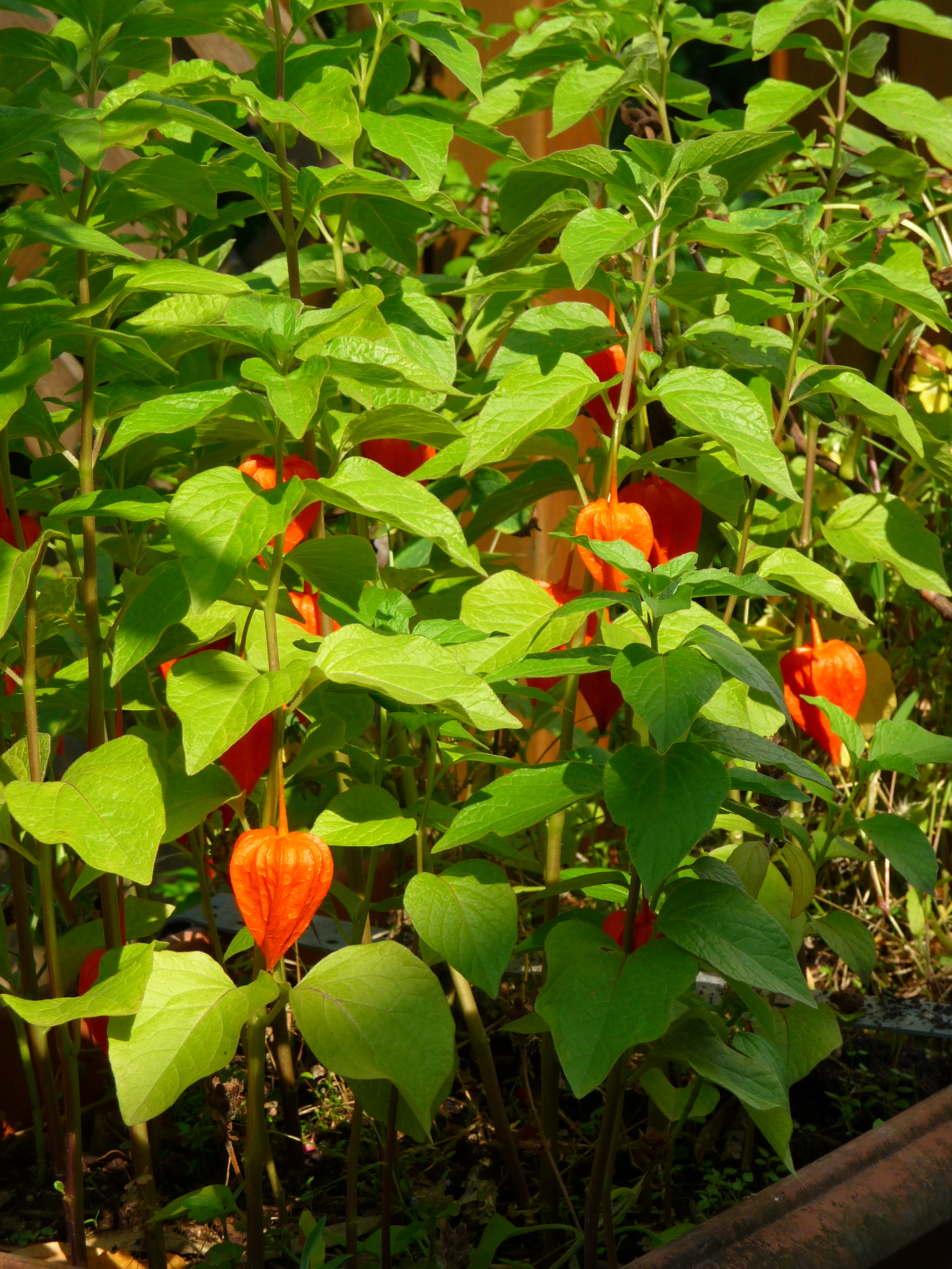 Lampionblumen (Physalis alkekengi), fotografiert im nördlichen Baden-Württemberg (Deutschland)